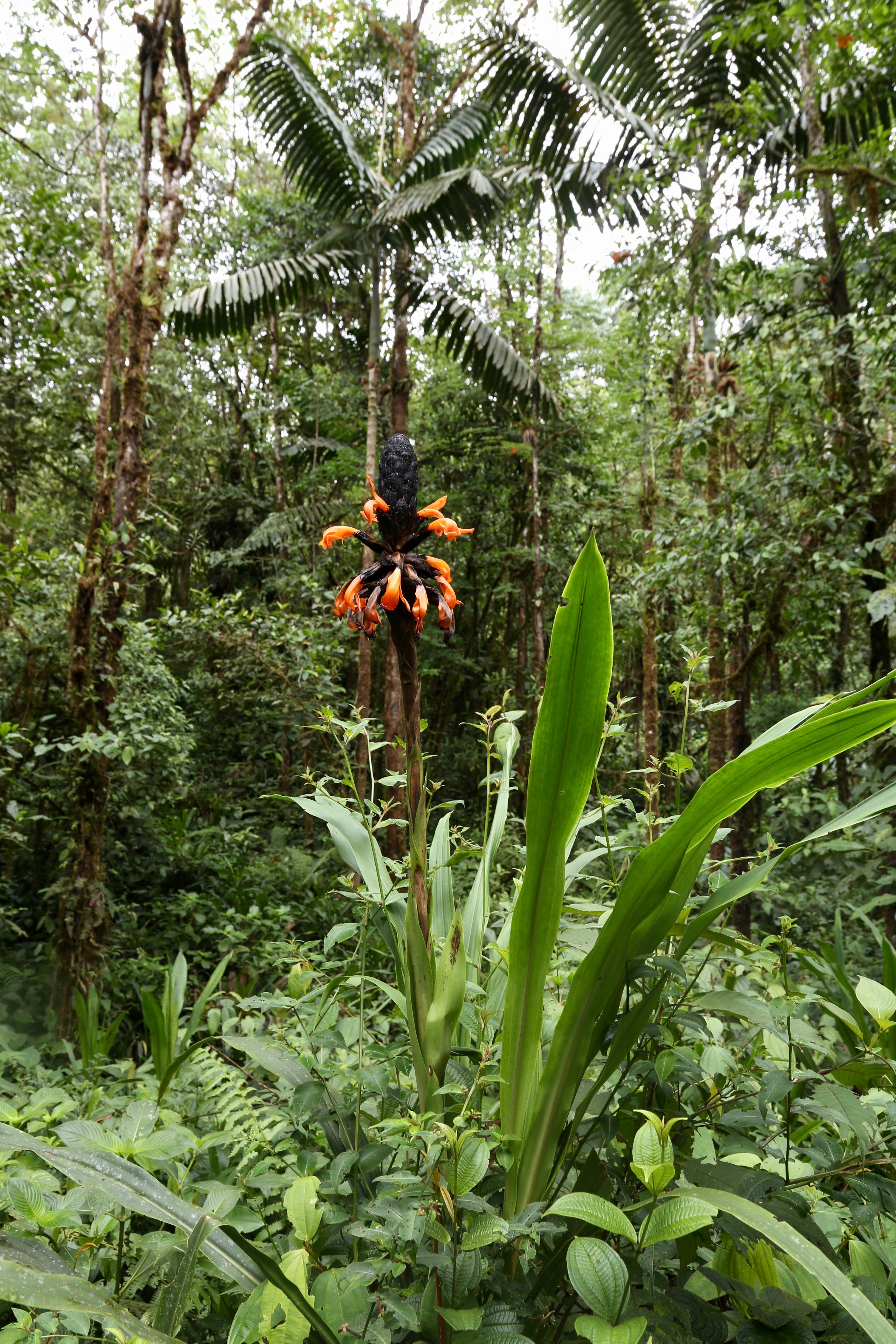 Ecuador, Pastaza, Mera, Río Alpayacu.